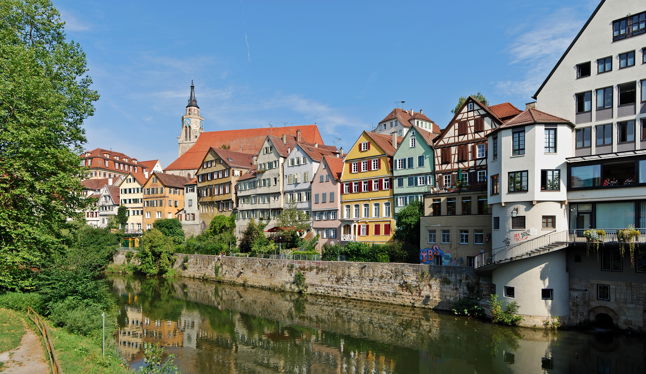 Die Neckarfront von Tübingen, Baden-Württemberg.